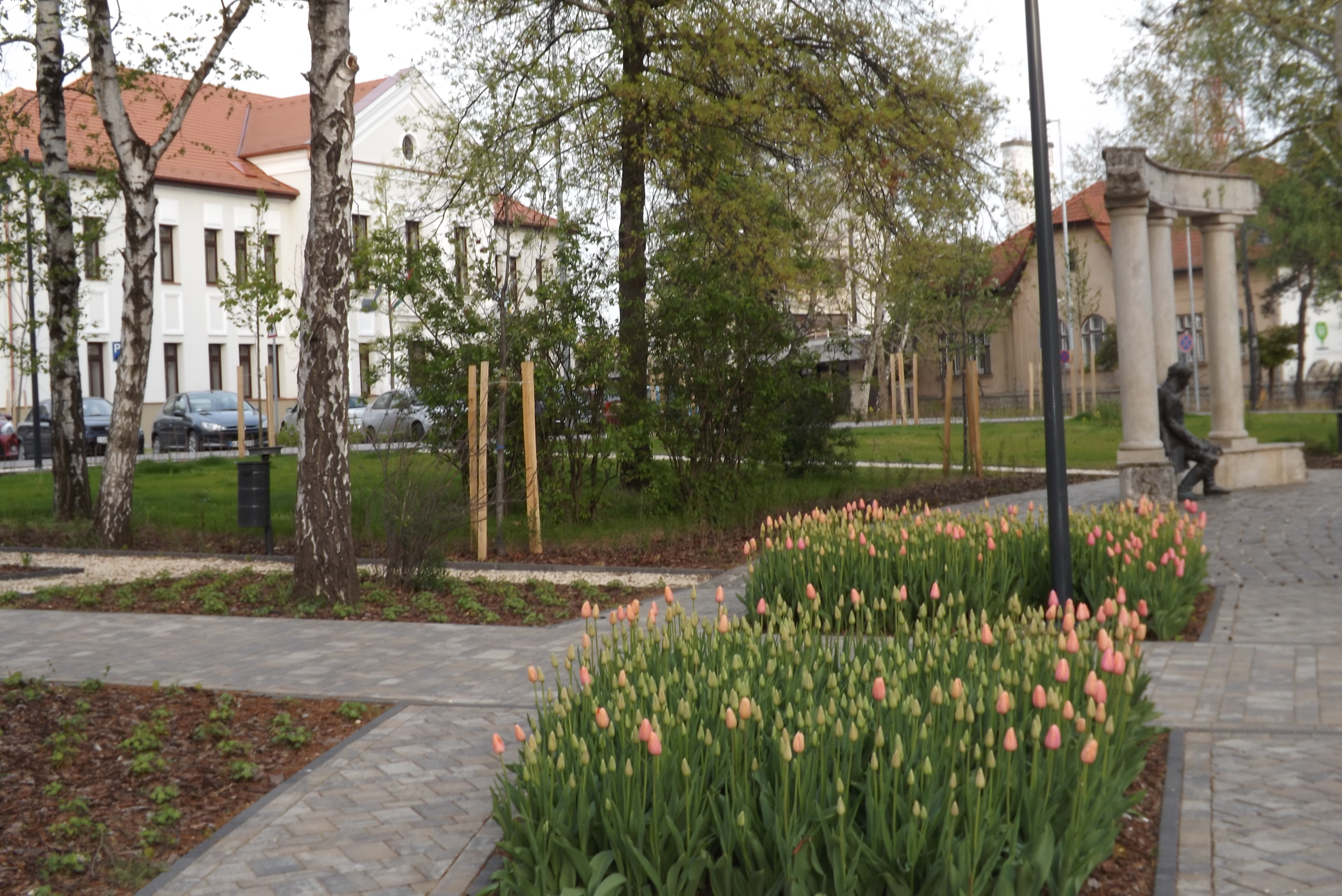 Mátészalkai parkrészlet